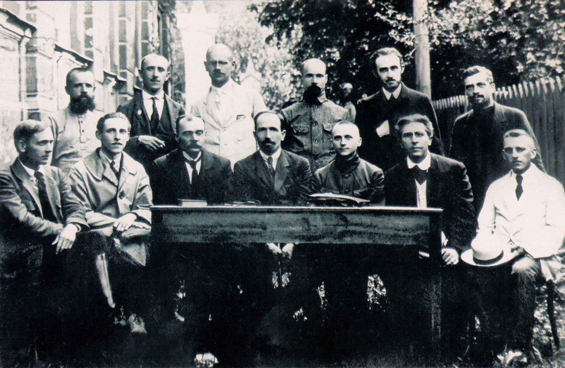 be:Інстытут беларускай культуры, навуковая камісія. Сядзяць злева направа: Я. Купала, А. Круталевіч, Я. Лёсік, С. Некрашэвіч, У. Чаржынскі, В. Шэмпель, М. Байкоў. Стаяць злева направа: 1, 2 - ?, 3 - Ч. Родзевіч, 4 - Я. Колас, 5 - К.М. Гадыцкі-Цвірка, 6 - Я. Дыла (са слоў М. Улашчыка). Менск, 1922 г.